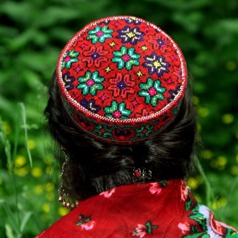 Традиционный головной убор ваханцев